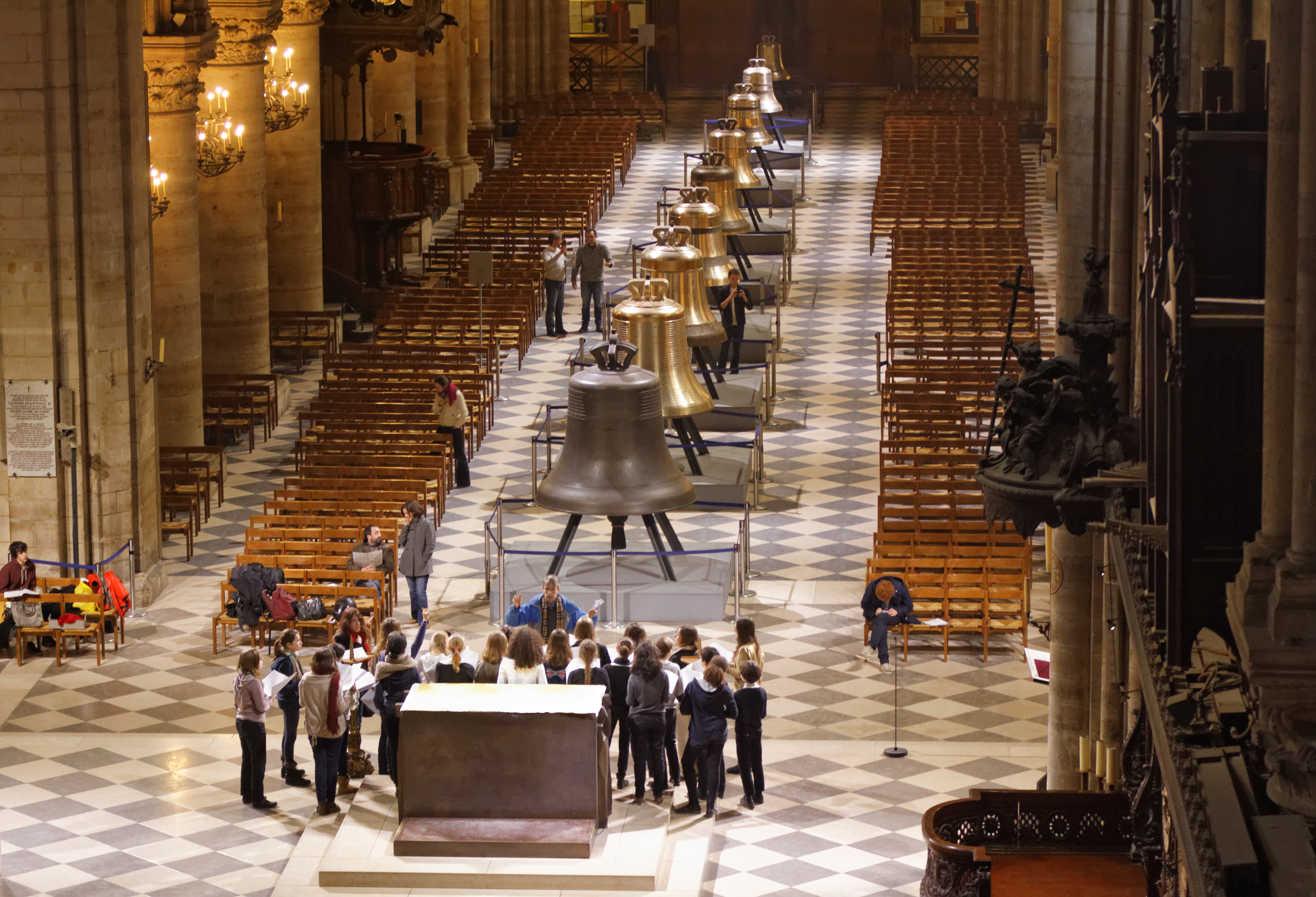 Les nouvelles cloches de la cathédrale Notre-Dame de Paris exposées au public dans la nef du 2 au 25 février 2013 avant leur installation dans les tours du monument.